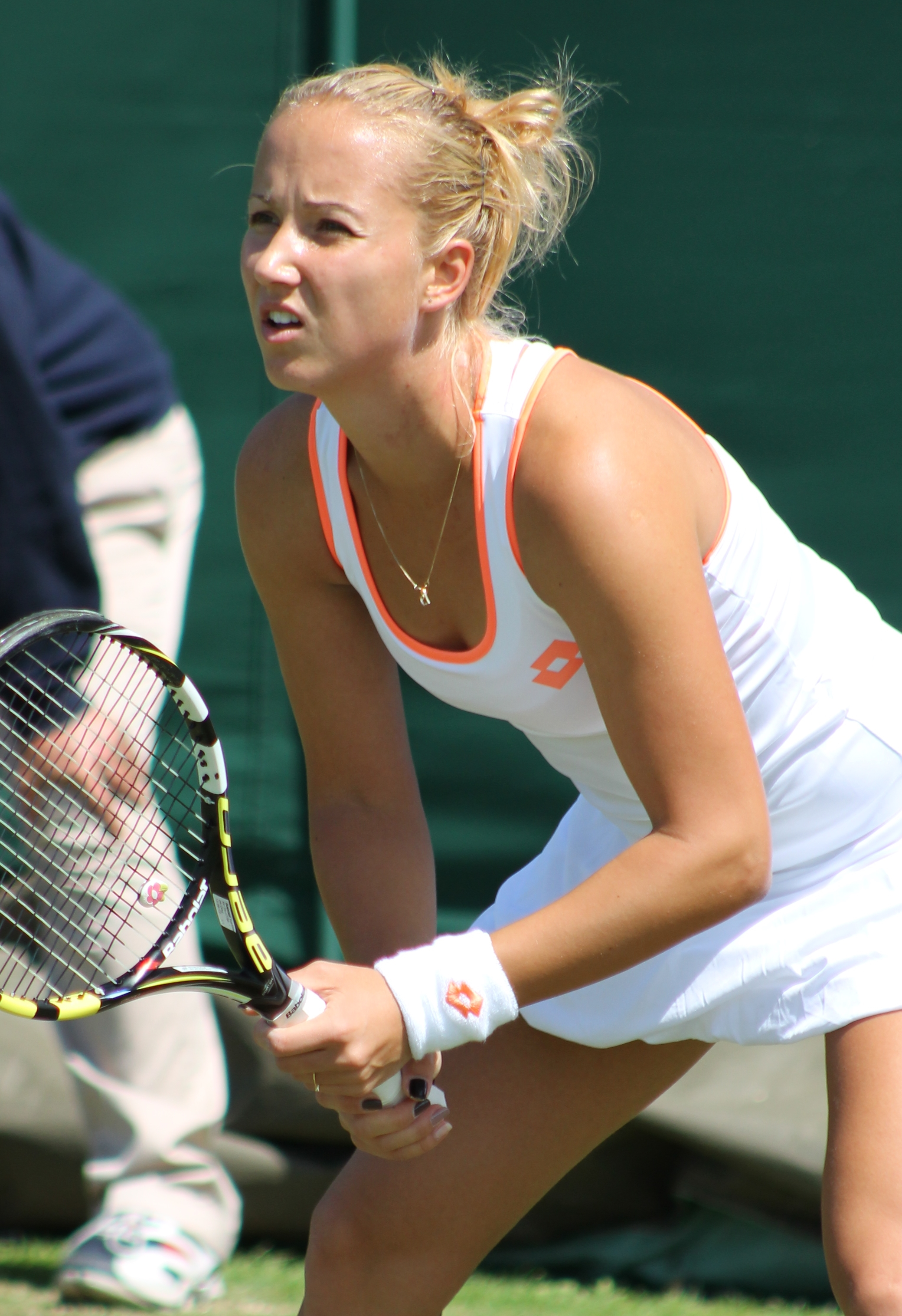 Kania WMQ14 (7)